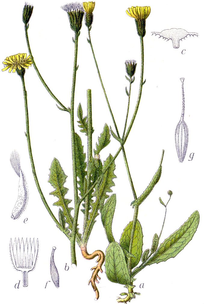 a, c, g. Crepis setosa Haller f. b, d - f. Crepis foetida L. Original Caption a, c, g. Borstige Grundfeste, Crepis setosa b, d - f. Stinkender Pippau, C. foetida